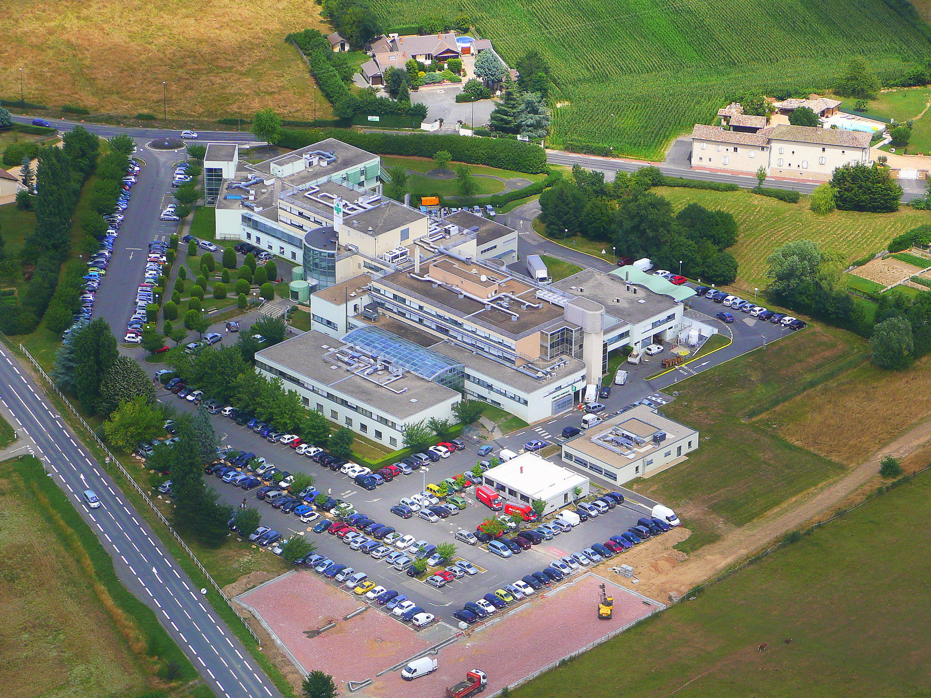 Vue aérienne de la polyclinique d'Arnas